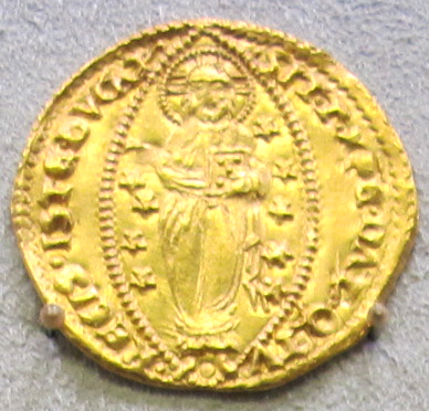 Venezia, ducato d'oro (zecchino), 1280-89 verso 2